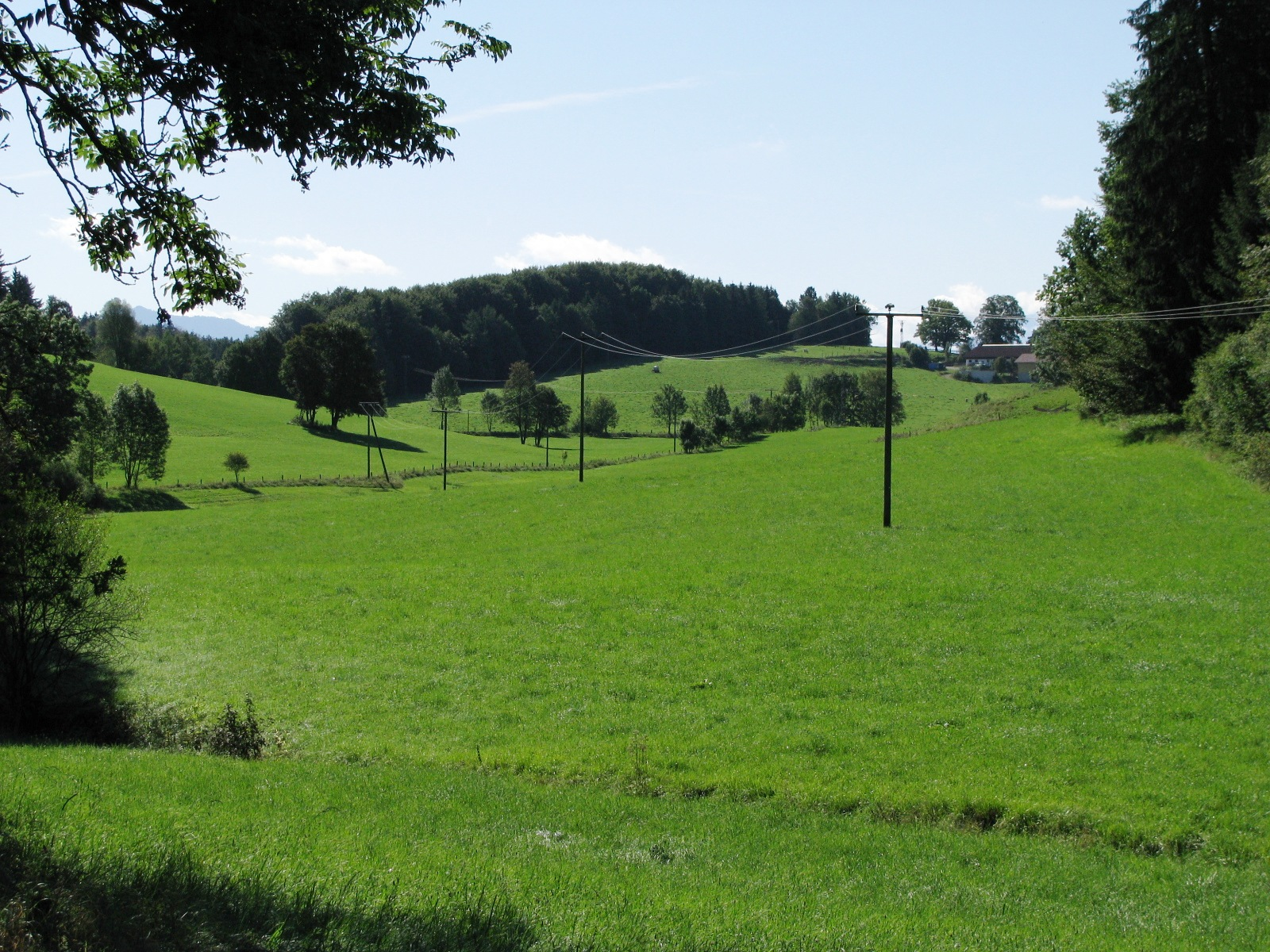 Im Eberfinger Drumlinfeld bei Wolfetsried